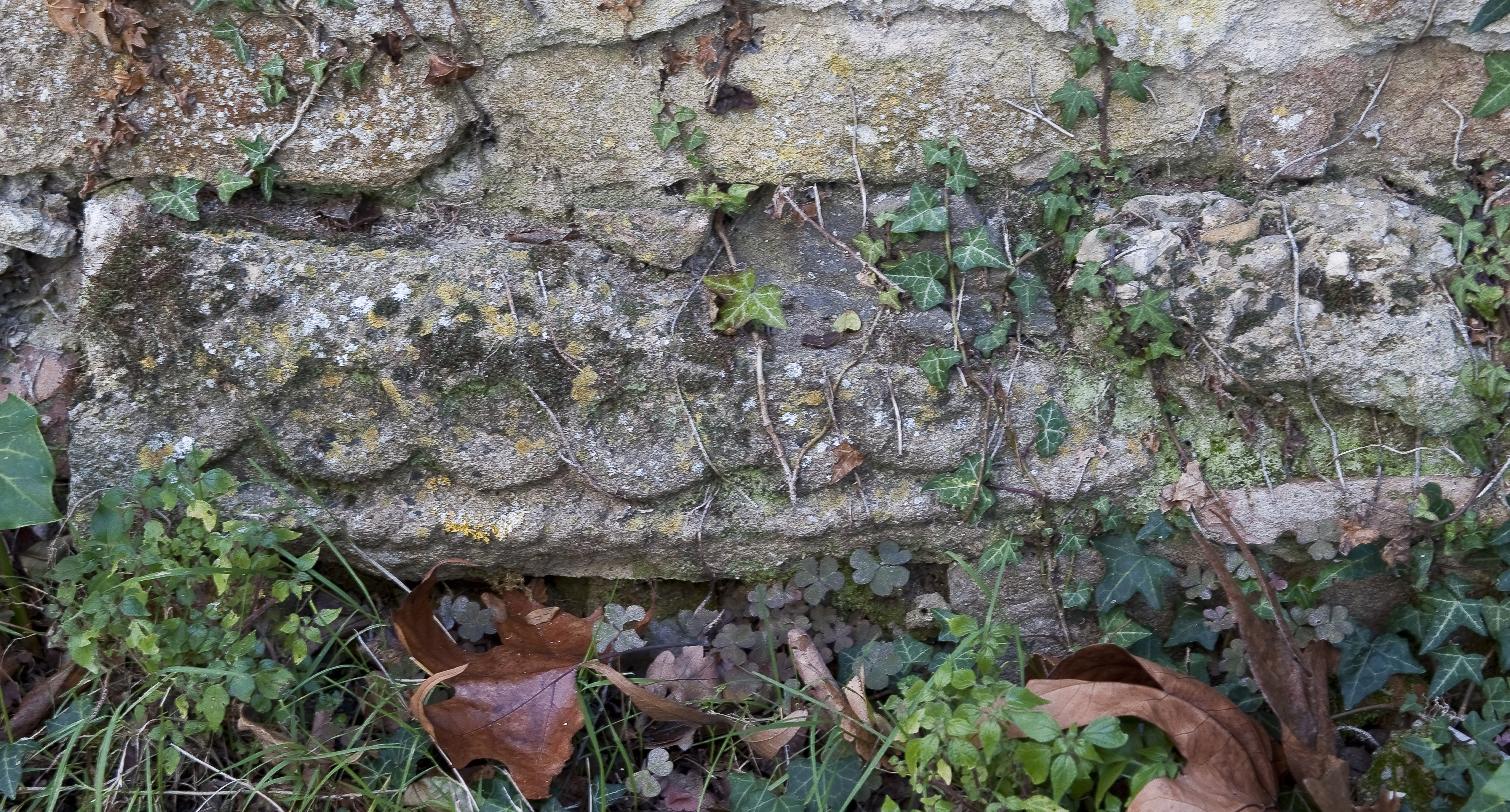 Pietra scolpita risalente al XII secolo. Pieve vecchia di Castelfiorentino